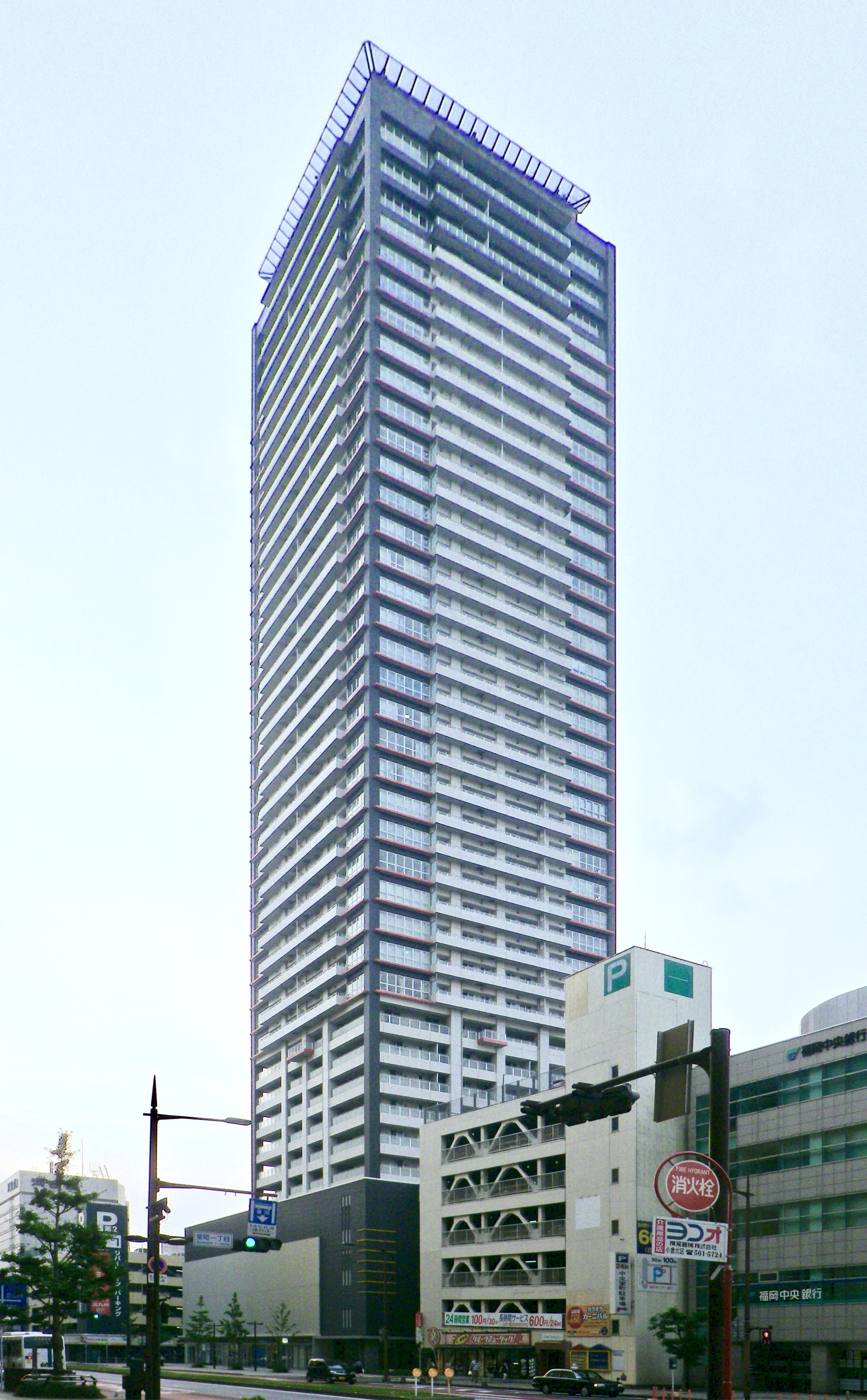 小倉DCタワー。